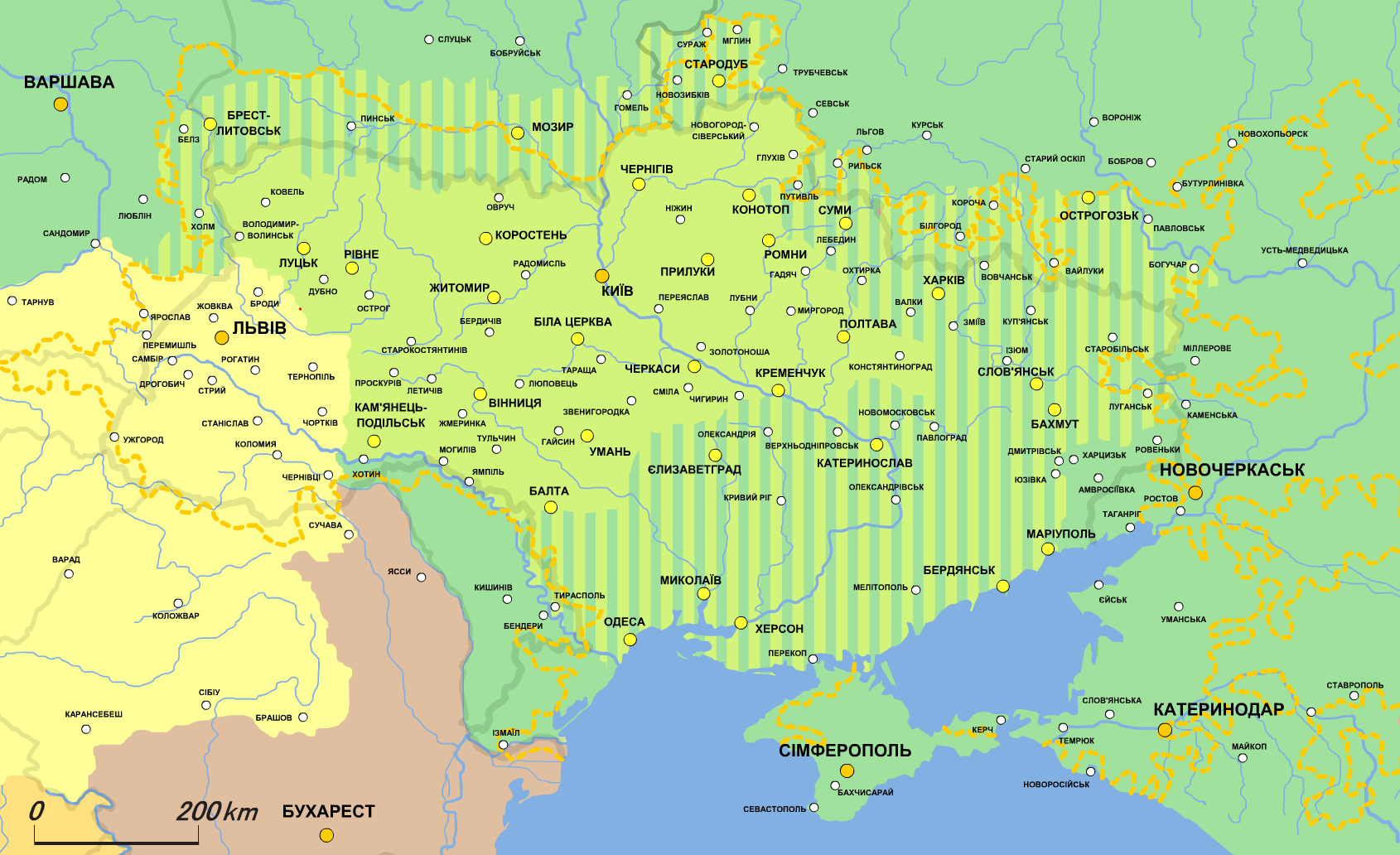 Карта Української автономії (1918.VIII.17) Територія автономної України, визнана російським урядом згідно з "Тимчасової інструкції Генеральному Секретаріатові Тимчасового уряду на Україні" (17 серпня 1917) Території на які претендував Генеральний Секретаріат України Межі проживання українців Російська Імперія Австро-Угорська Імперія Румунське королівство Сербія